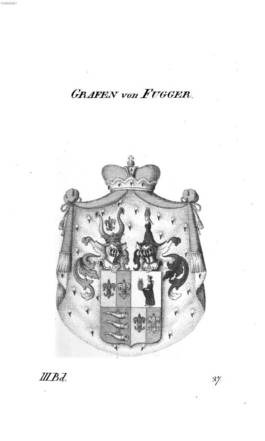 Wappen Fugger - Tyroff AT.jpg